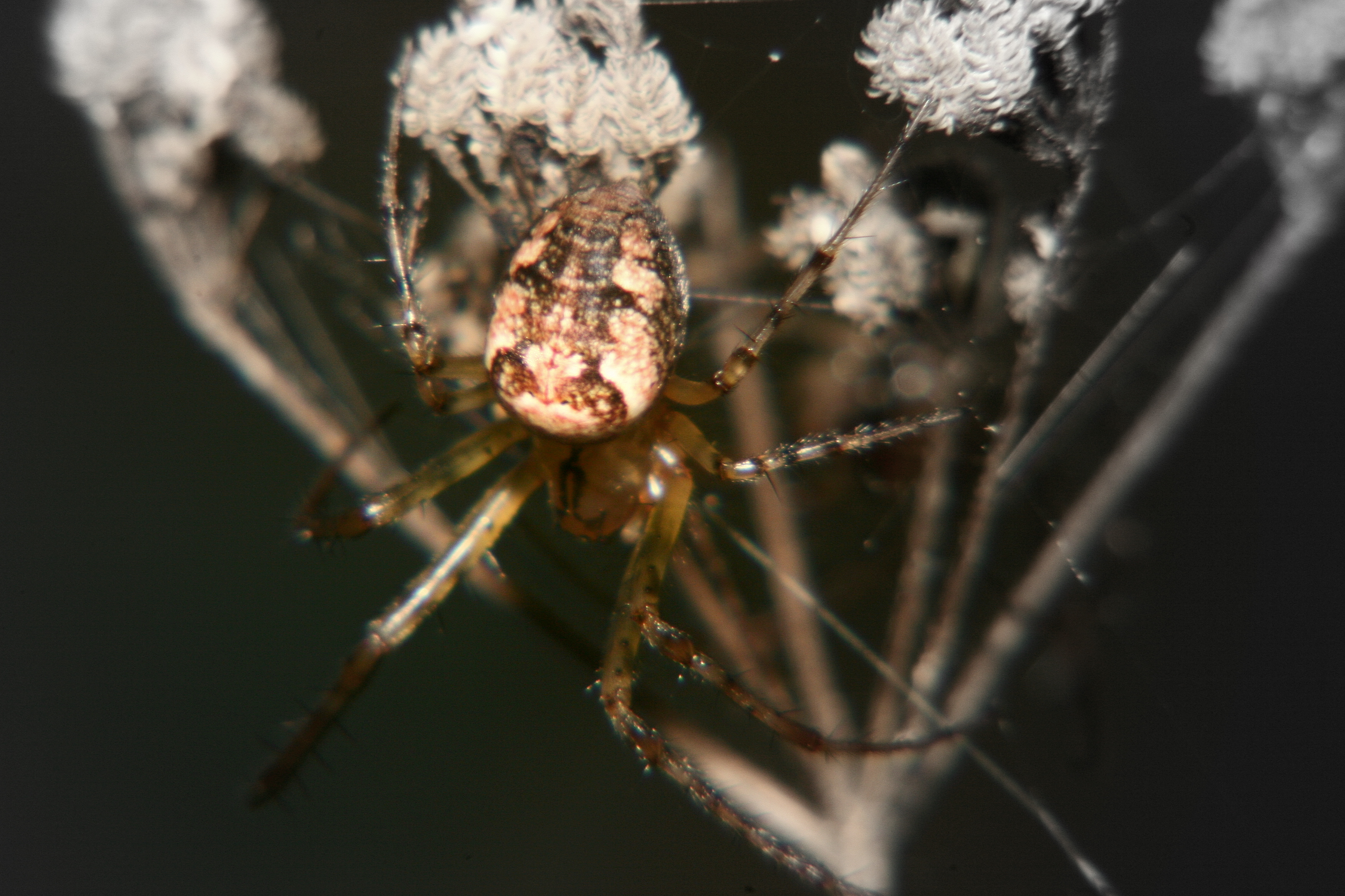 Beispiel einer Makro-Aufnahme (hier Herbstspinne auf Dolde) mit einer Nahlinse (vierfach Diopter) Freihand und Blitz. Zur Demonstration der optischen Qualität von Nahlinsen, typischer Verzerrungen und der zu erwartenden Schärfentiefe. Hier Extremsituation. Objektiv 75x300 IS USM Canon mit Nahlinse bei 265mm (entsprechend 435mm Kleinbildaquivalent) mit Canon 20D. Nahlinse 4, 435mm, Blende 29, 1/80s, ISO 400, 3504x2336